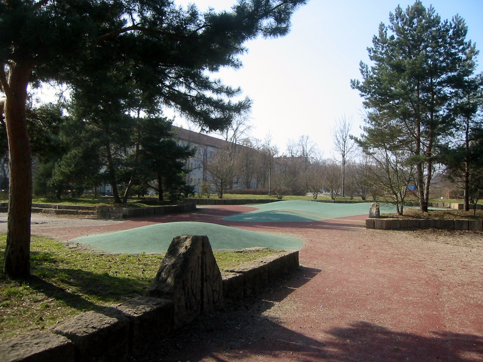 Spielplatz mit dem Motto "Berge" im Carl-Weder-Park in Berlin-Britz (Bezirk Neukölln). Der Park wurde als Ausgleichsmaßnahme für den Bau der A100 angelegt und befindet sich auf der Tunneldecke des Autobahntunnels Britz